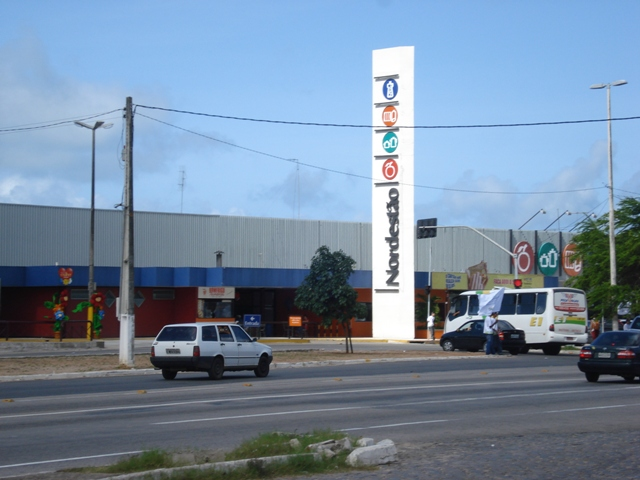 Supermercado Nordestão Cidade Jardim em Natal, Rio Grande do Norte, Brasil